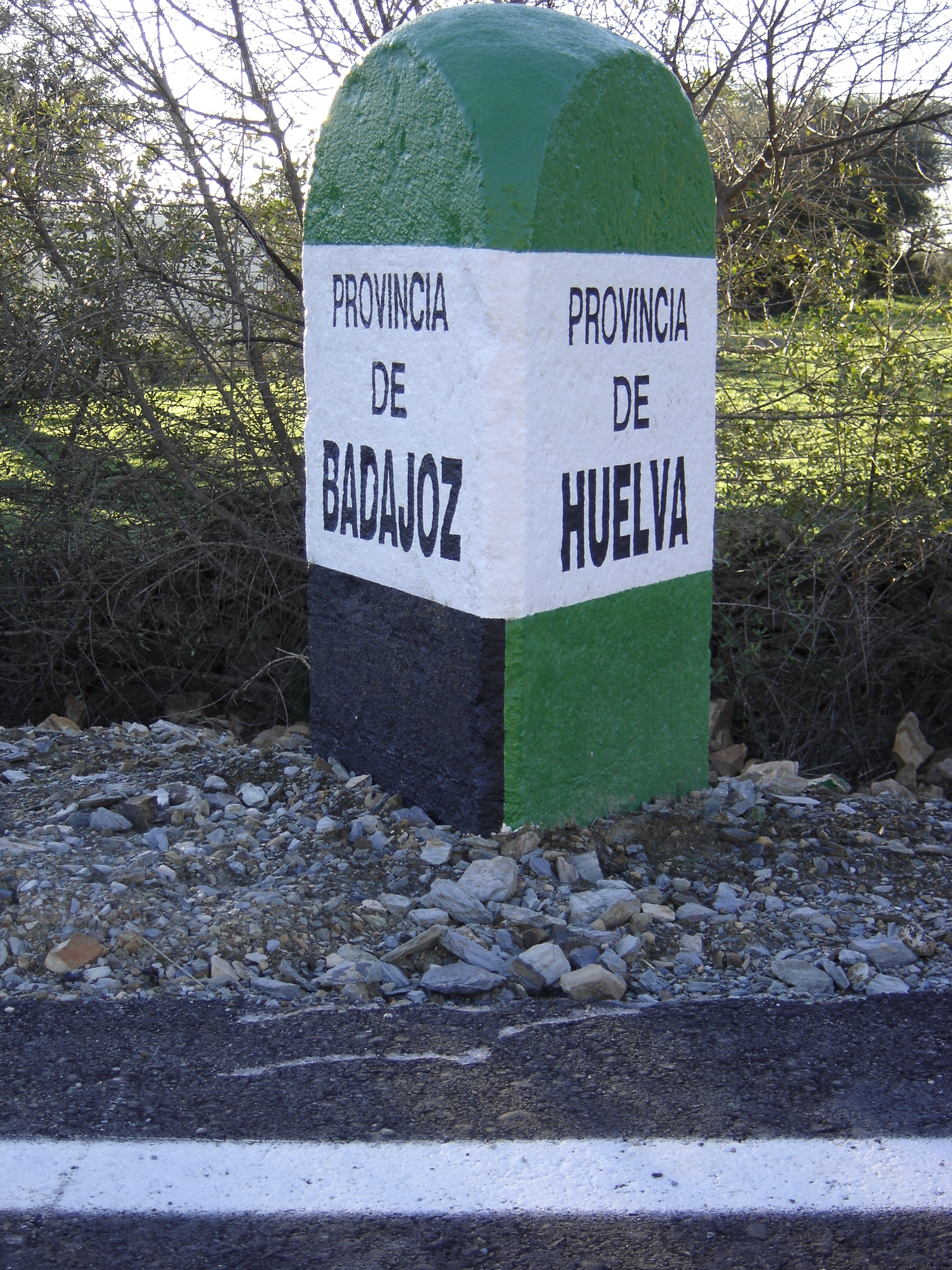 Hito de granito en cambio de provincia y Comunidad Autónoma